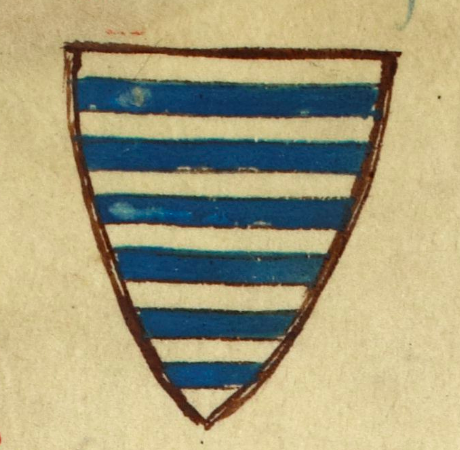 Coats of arms of the House of Lusignan